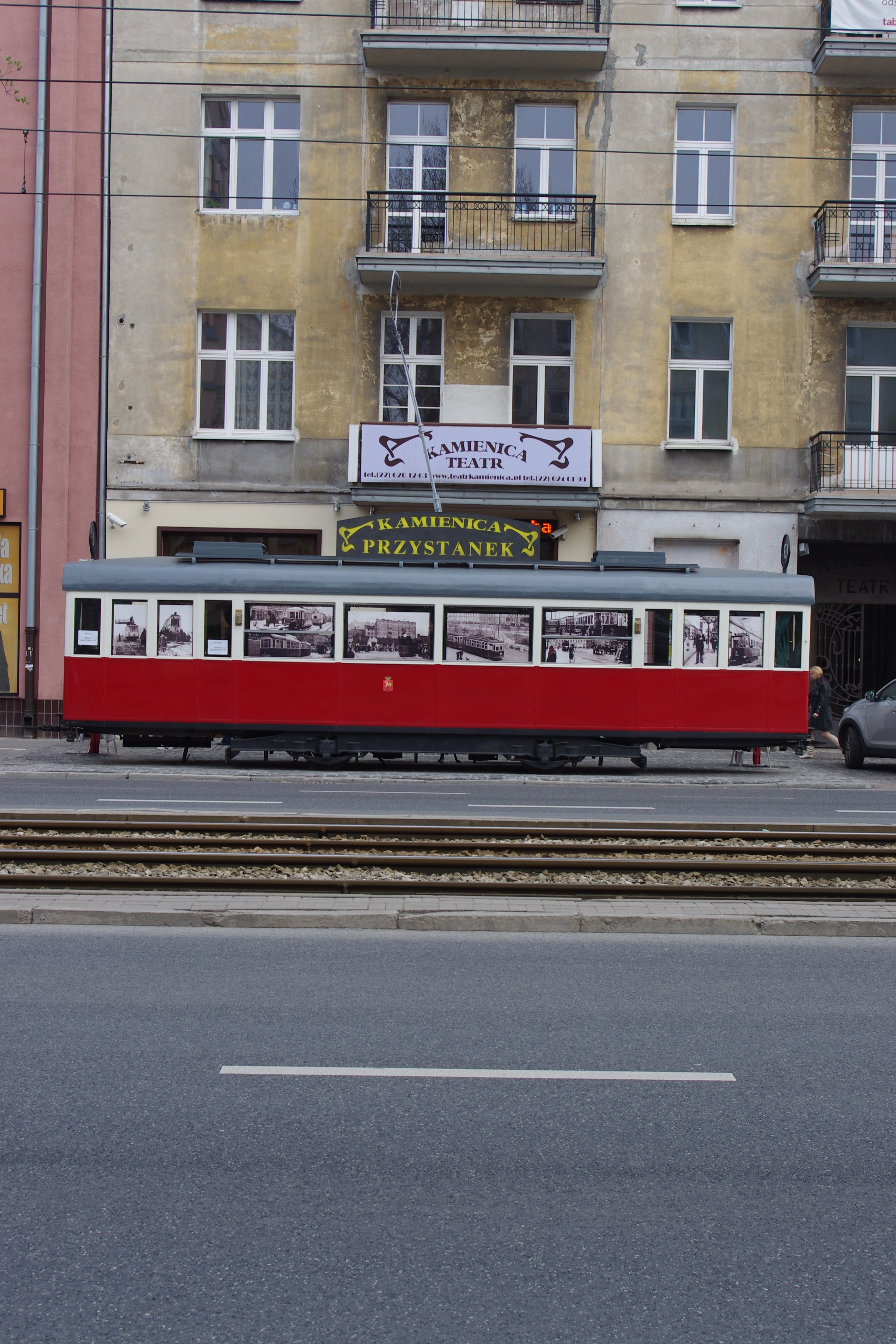 Zabytkowy tramwaj ("berlinka") przed wejściem do Teatru Kamienica w Warszawie, ustawiony w marcu 2013 r., z okazji czwartych urodziny Teatru.